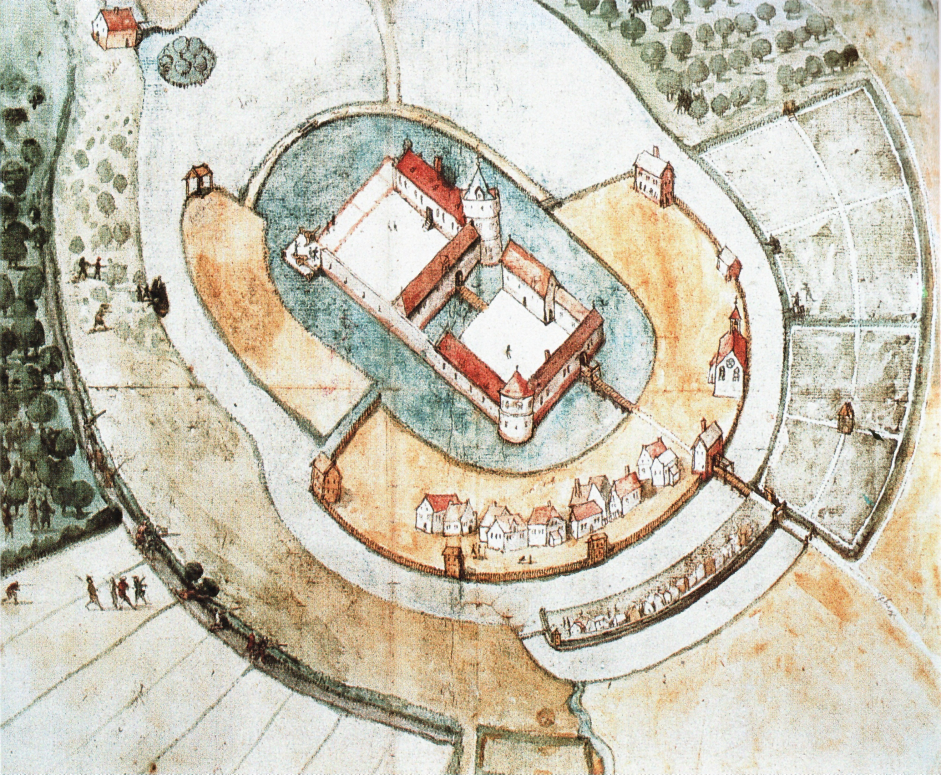 aquarellierte Federzeichnung der Burg Raesfeld um 1590, rückseitig mit "Delinyrung des Hauses und Schanzten Raesfelt" bezeichnet